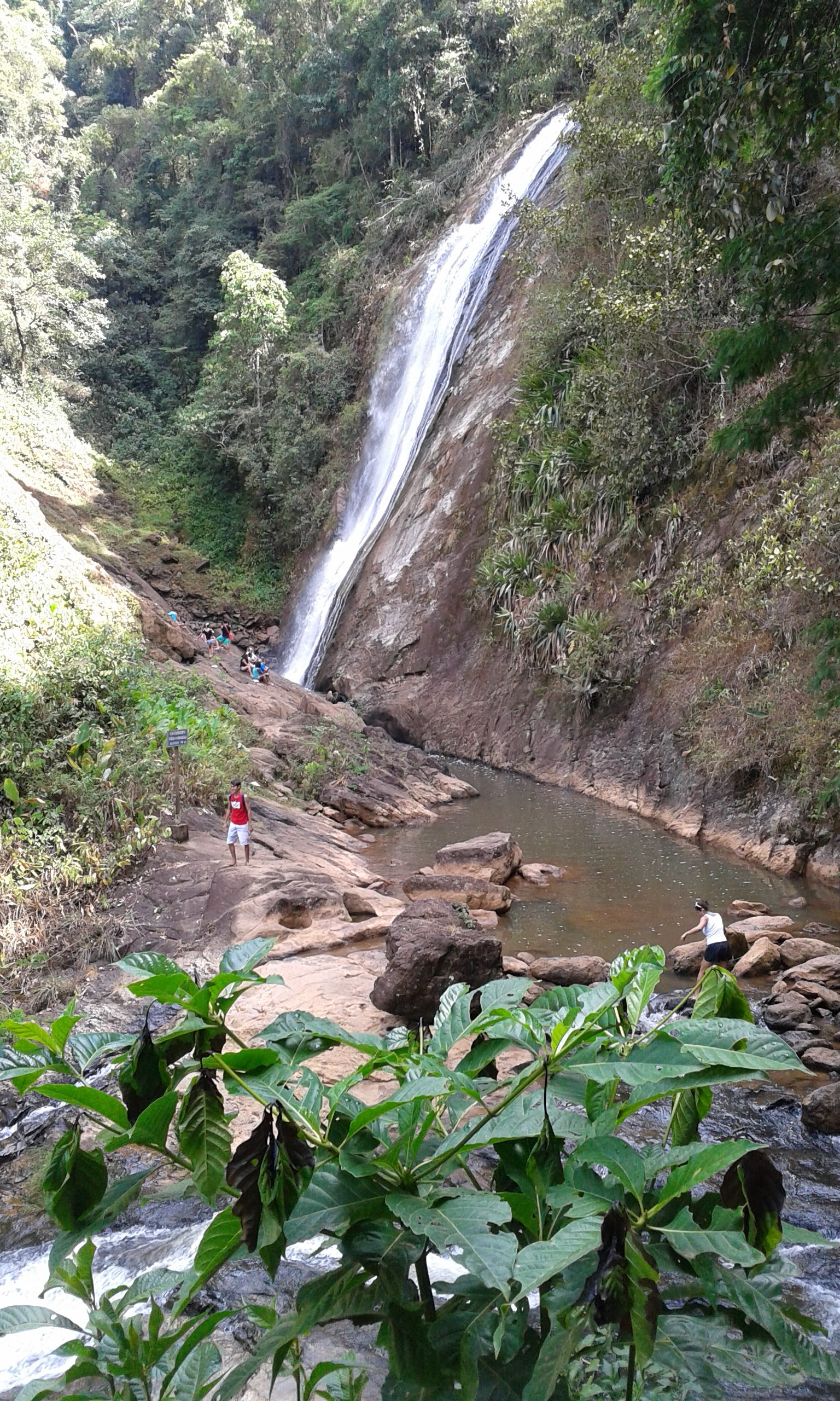 Sombra e água fresca , paisagem deliro de amor .